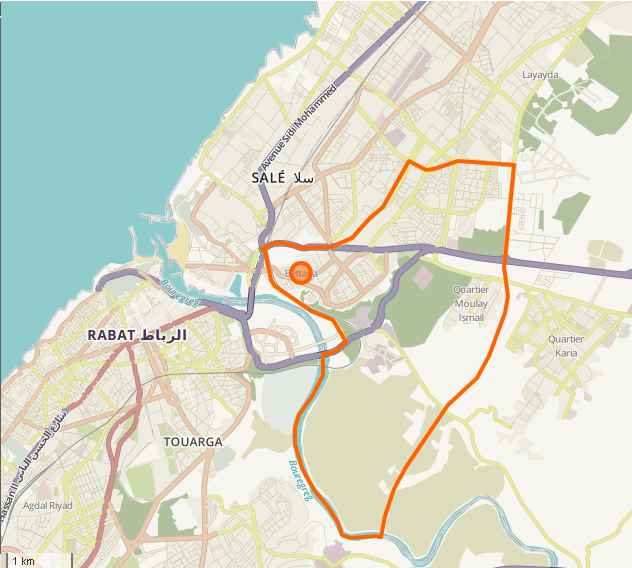 Carte de Bettana, Salé, Maroc. Limites géographiques de la carte : N : 34.1061 E : -6.8469 W : -6.6807 S : 33.926